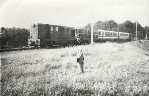 Koszalińska Kolej Wąskotorowa w czasach PKP